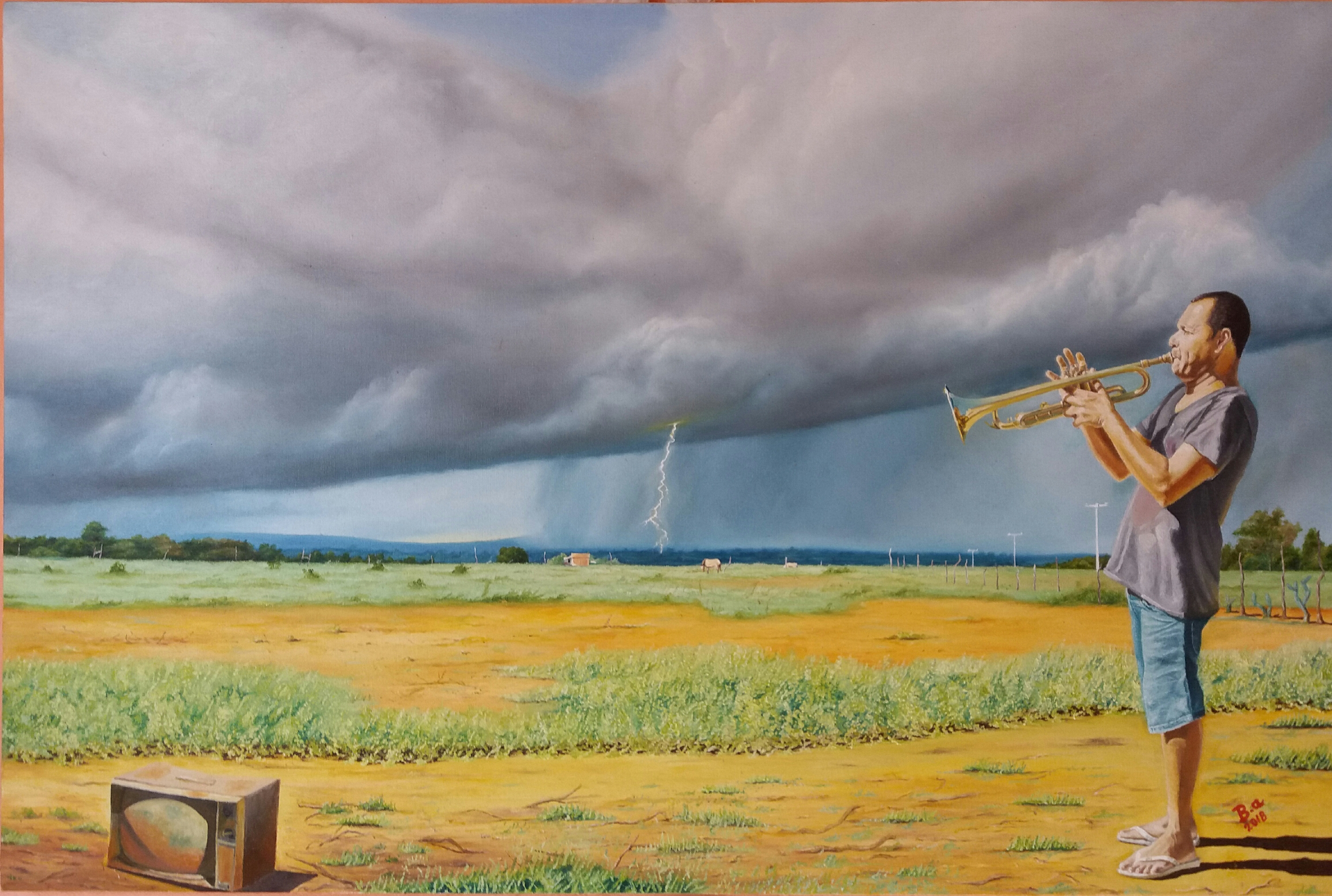 Óleo sobre tela 60 x 40. Coleção particular Artísta: B.a, 2018 Cafarnaum, Bahia, Brasil